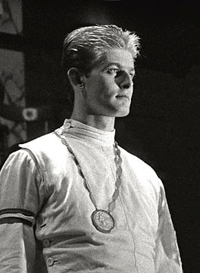 Zoltán Horváth at the 1960 Olympics.